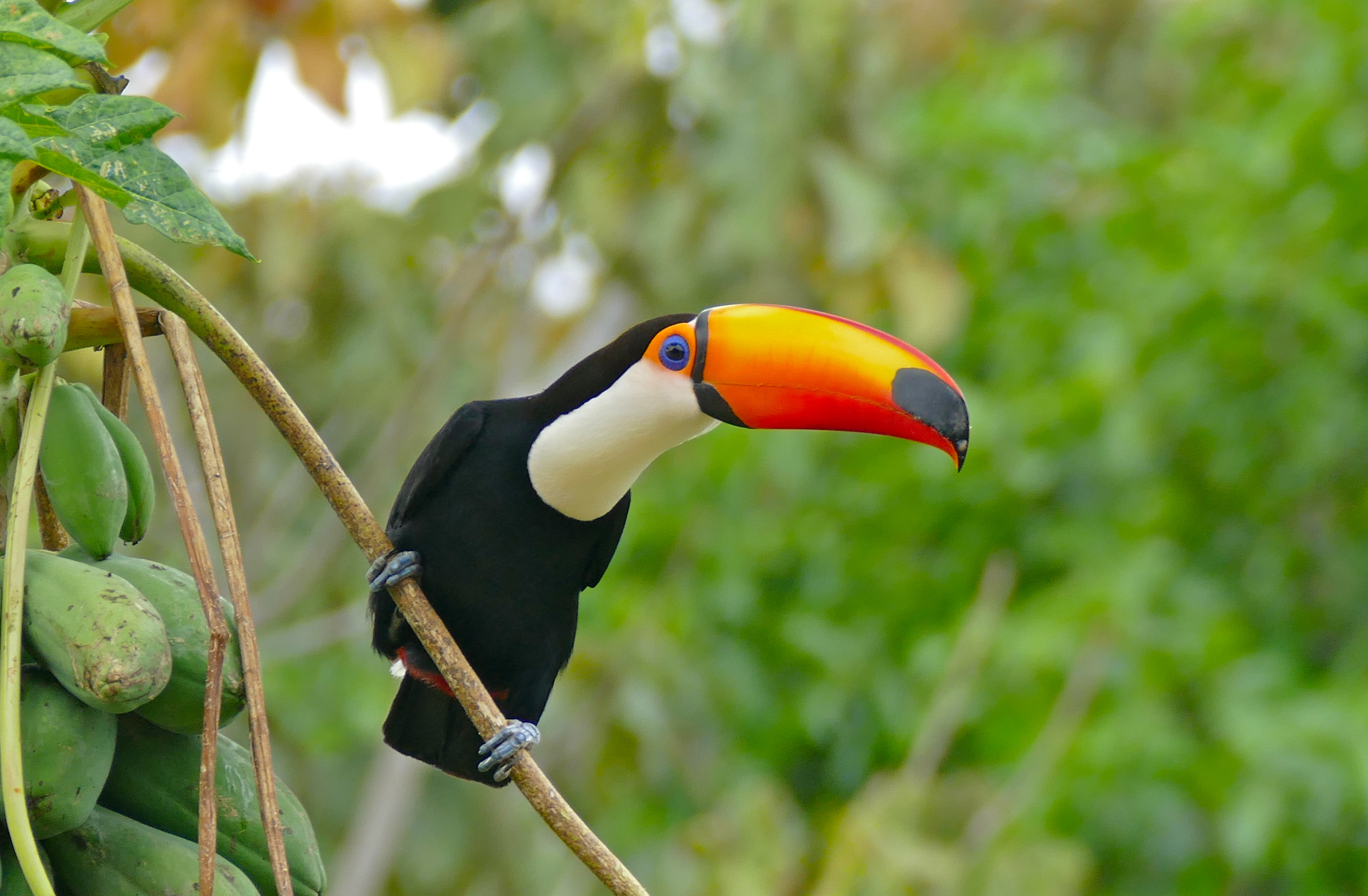 Pouso Alegre, Transpantaneira, Poconé, Mato Grosso, BRAZIL